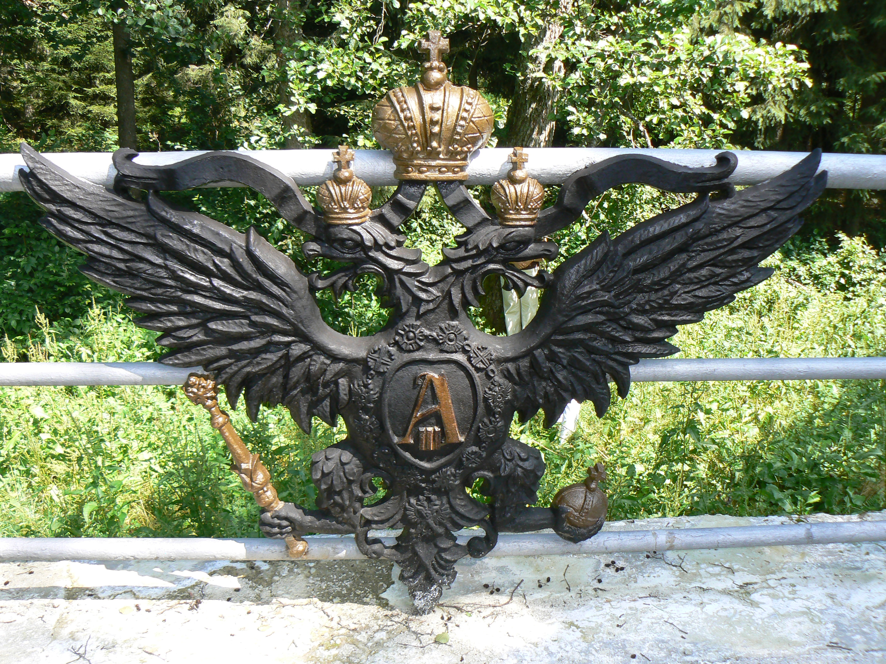 Беловежская Пуща